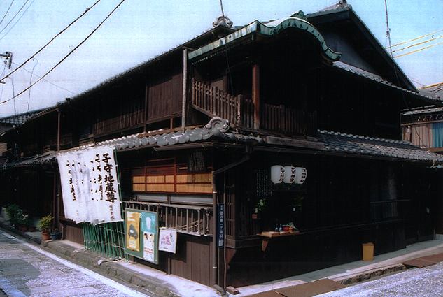 Yanegami/Nagoya-shi nishi-ku nagono